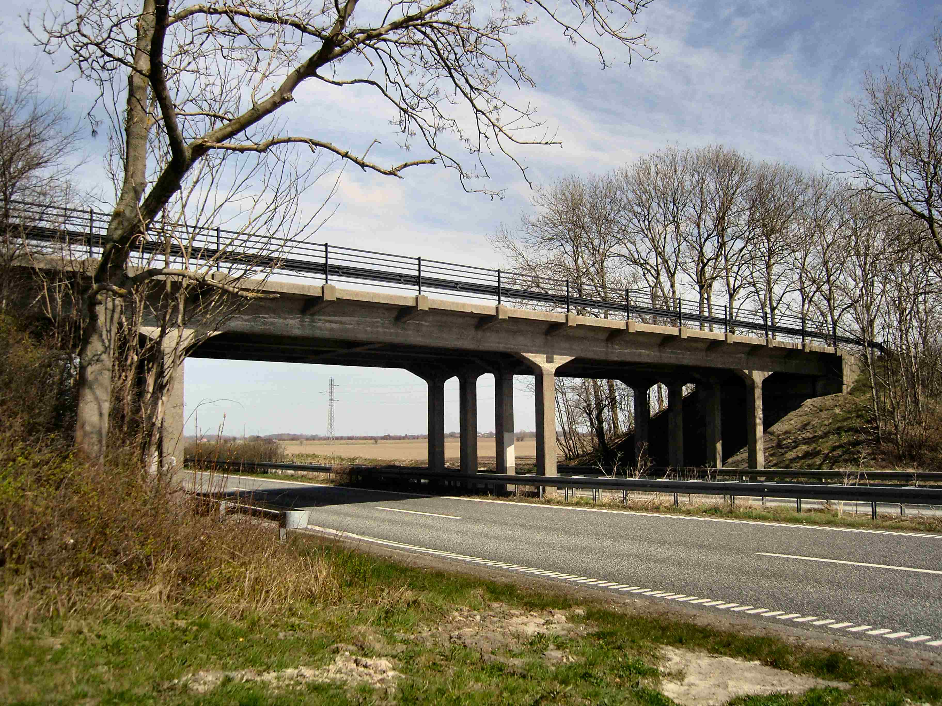 Motorvejsbro øst for Rødby bygget i perioden 1941-1944